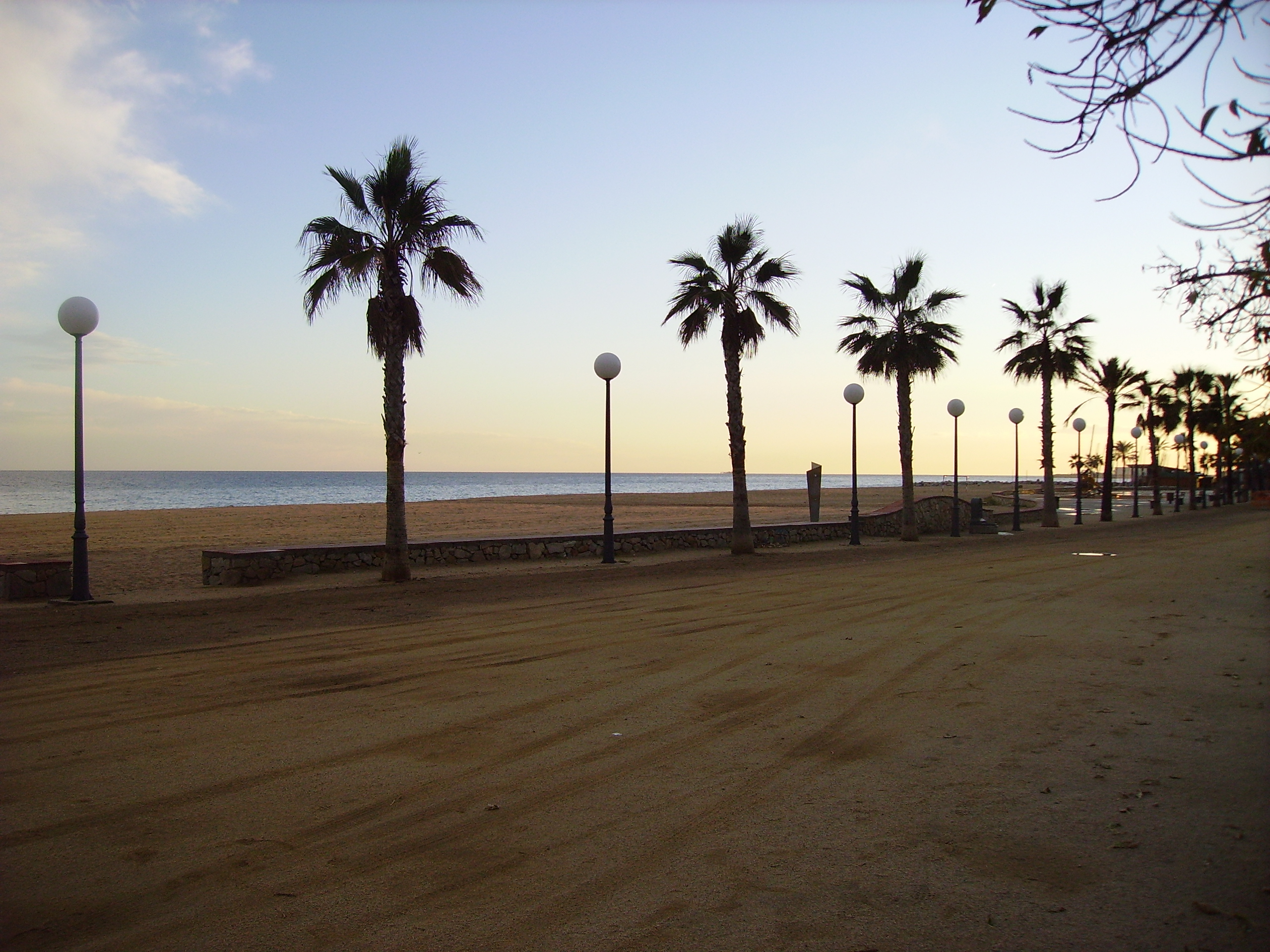 Canet de Mar, El Maresme, Catalunya.